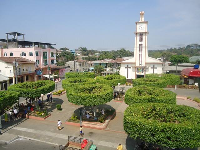 Parque central e iglesia de Mocache